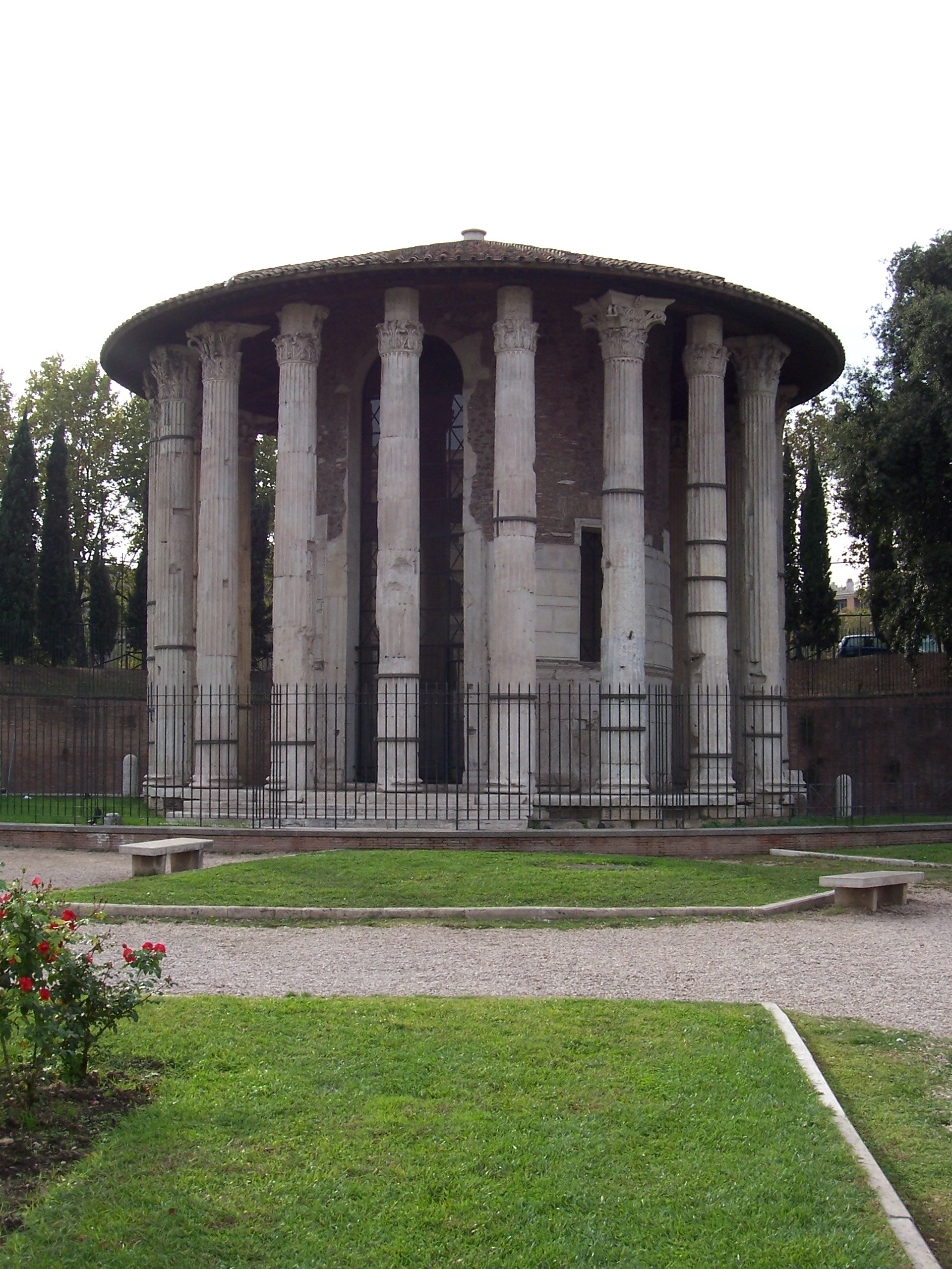 Forum Boarium in Rome